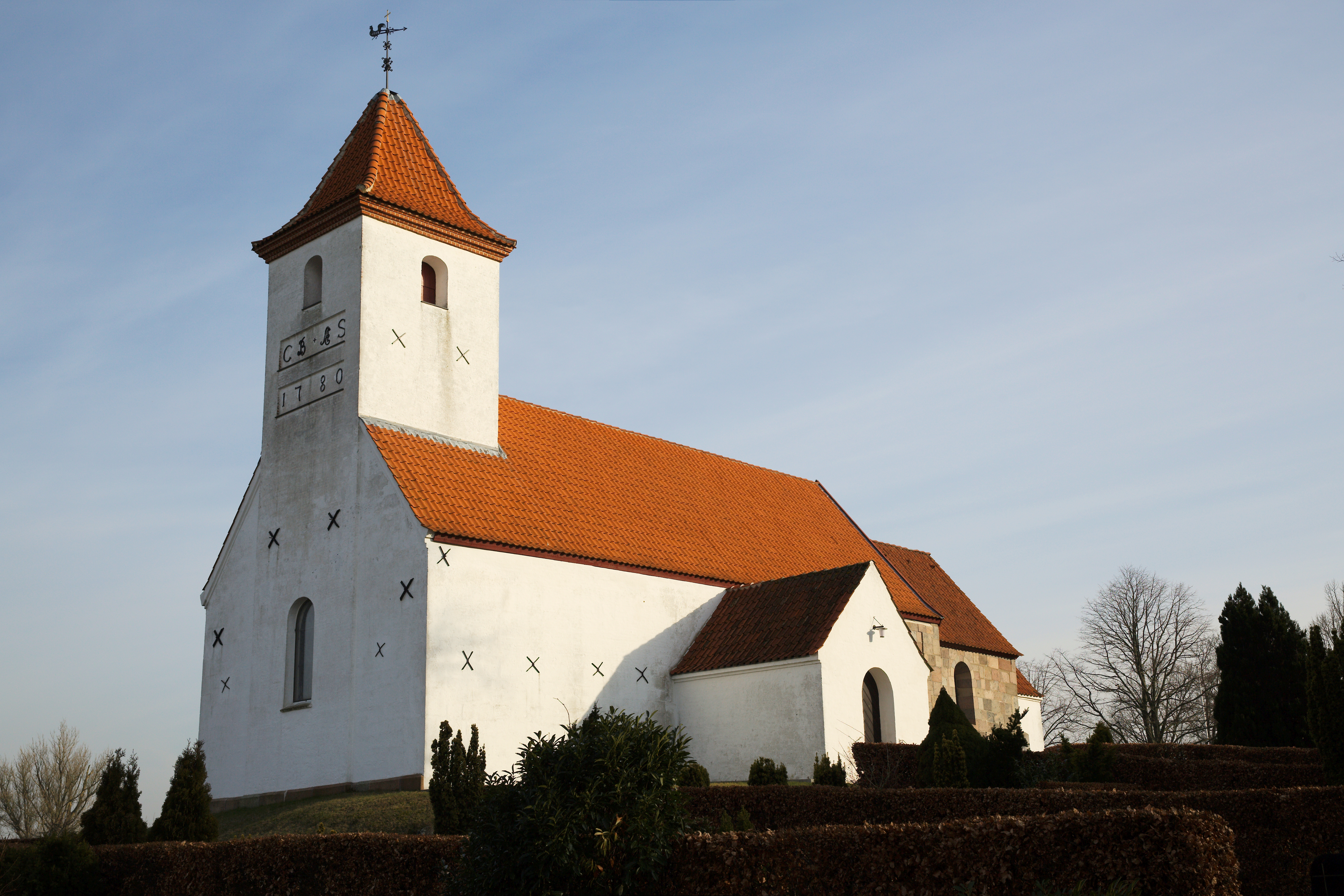 Astrup Kirke (Aarhus Kommune)